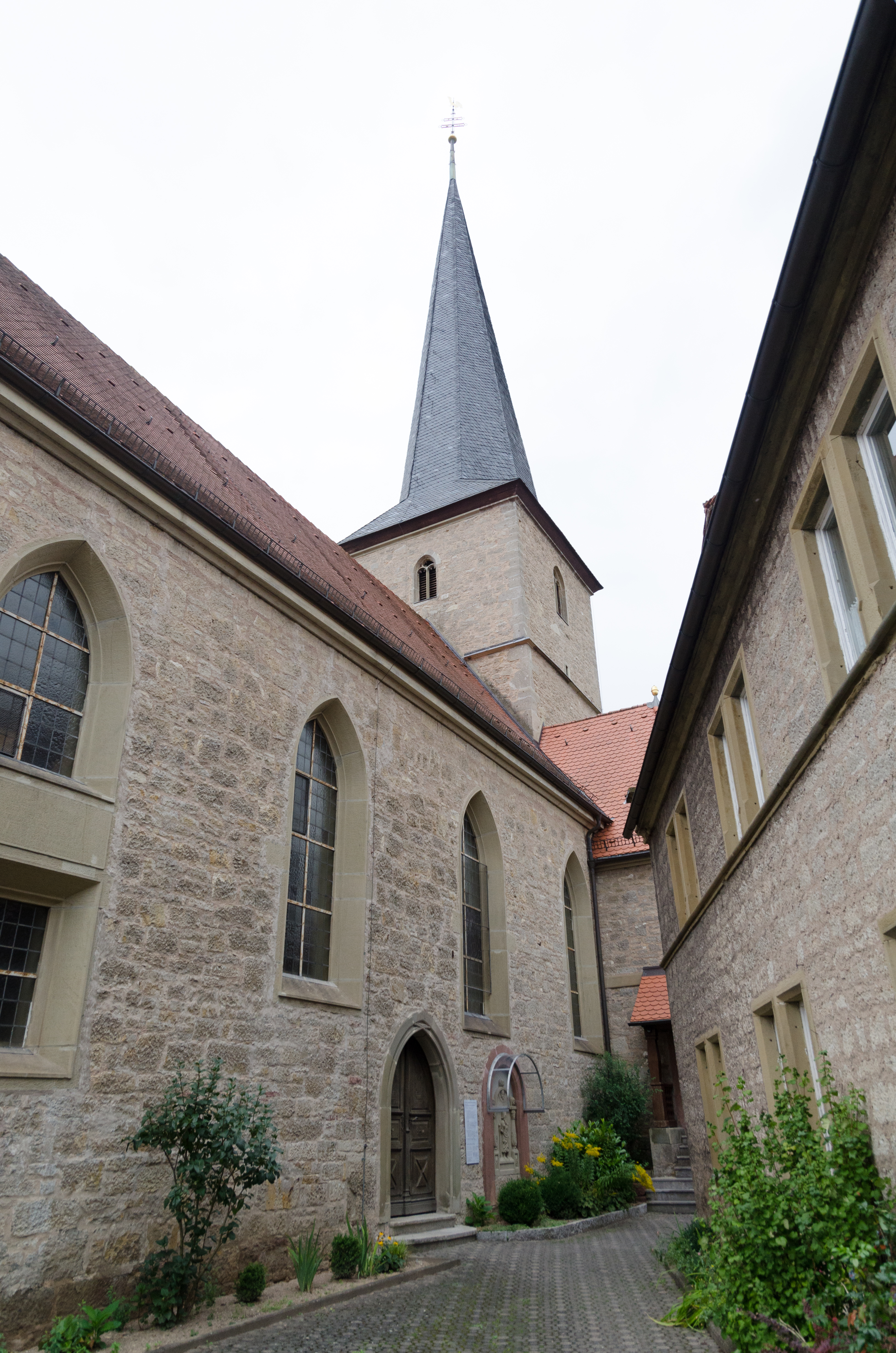 Machtilshausen, Katholische Pfarrkirche